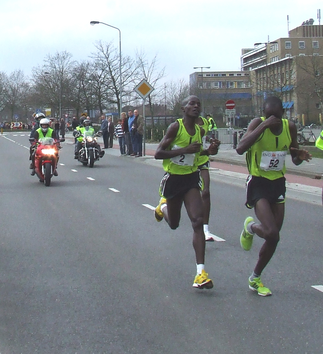 Foto van Elias Maindi, winnaar Venloop 2007. Foto gemaakt door Sindala 27 maart 2007.